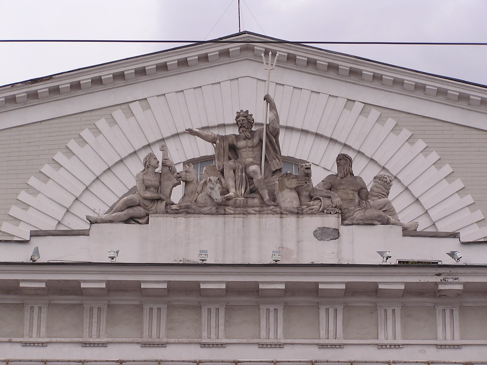 Санкт-Петербург. Биржа